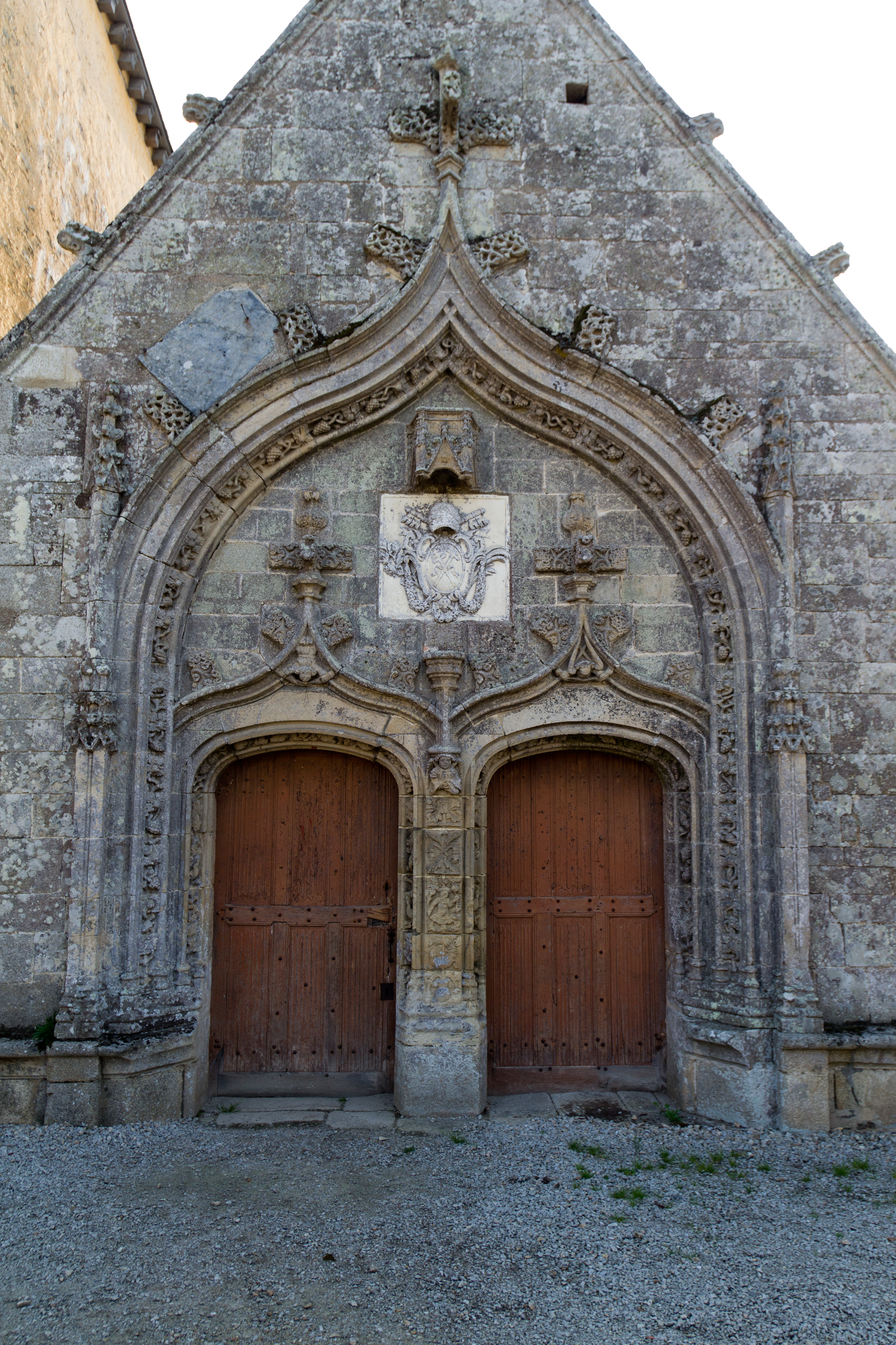 Le tympan prend une forme d'accolade, ainsi que le linteau de chacun des deux vantaux. Des motifs végétaux ornent l'ensemble. .